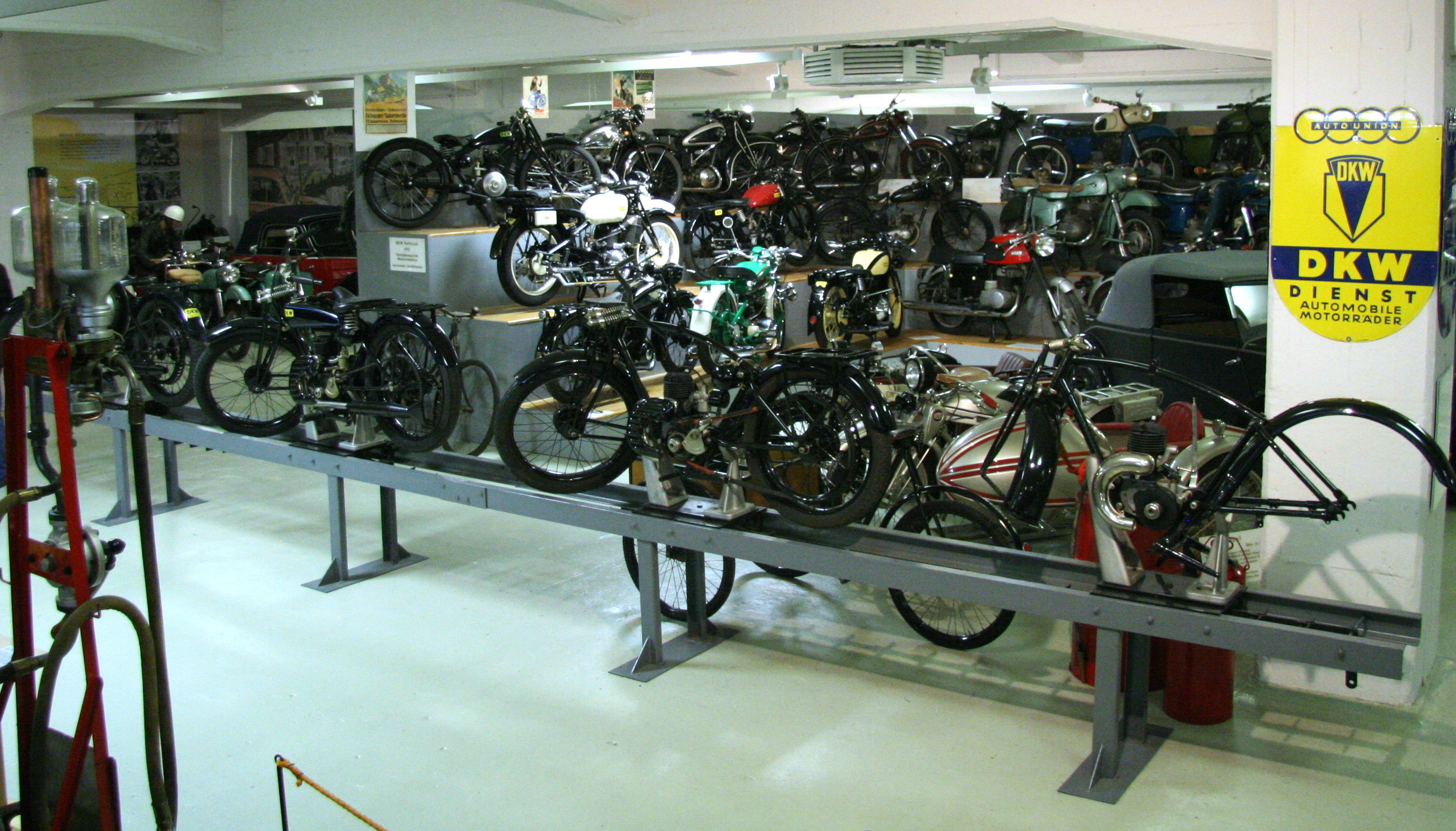 DKW Montagefliessband im Museum für sächsische Fahrzeuge in Chemnitz.